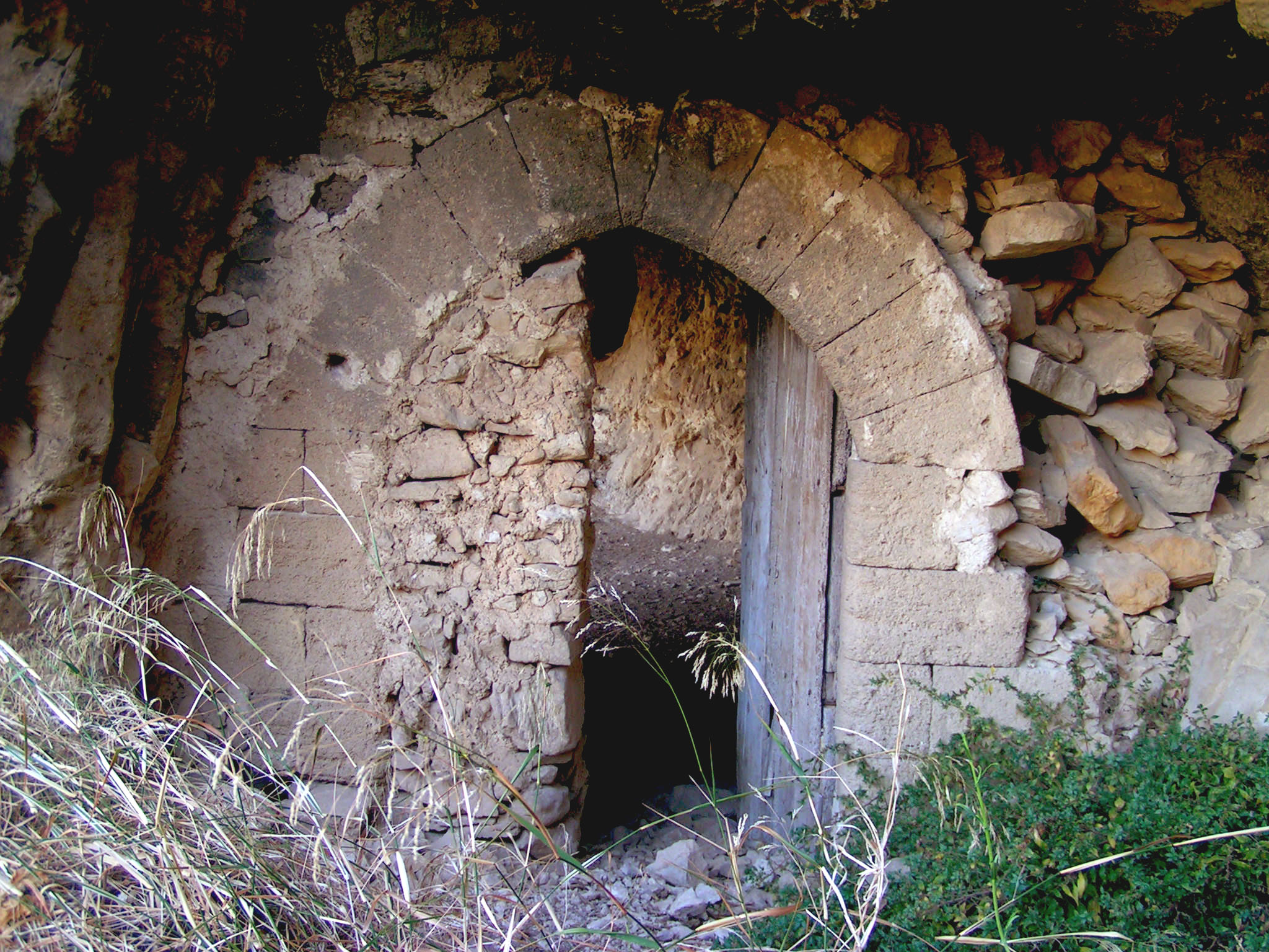 Mineo: Il portale del castello rupestre (secc.XIII-XIV)